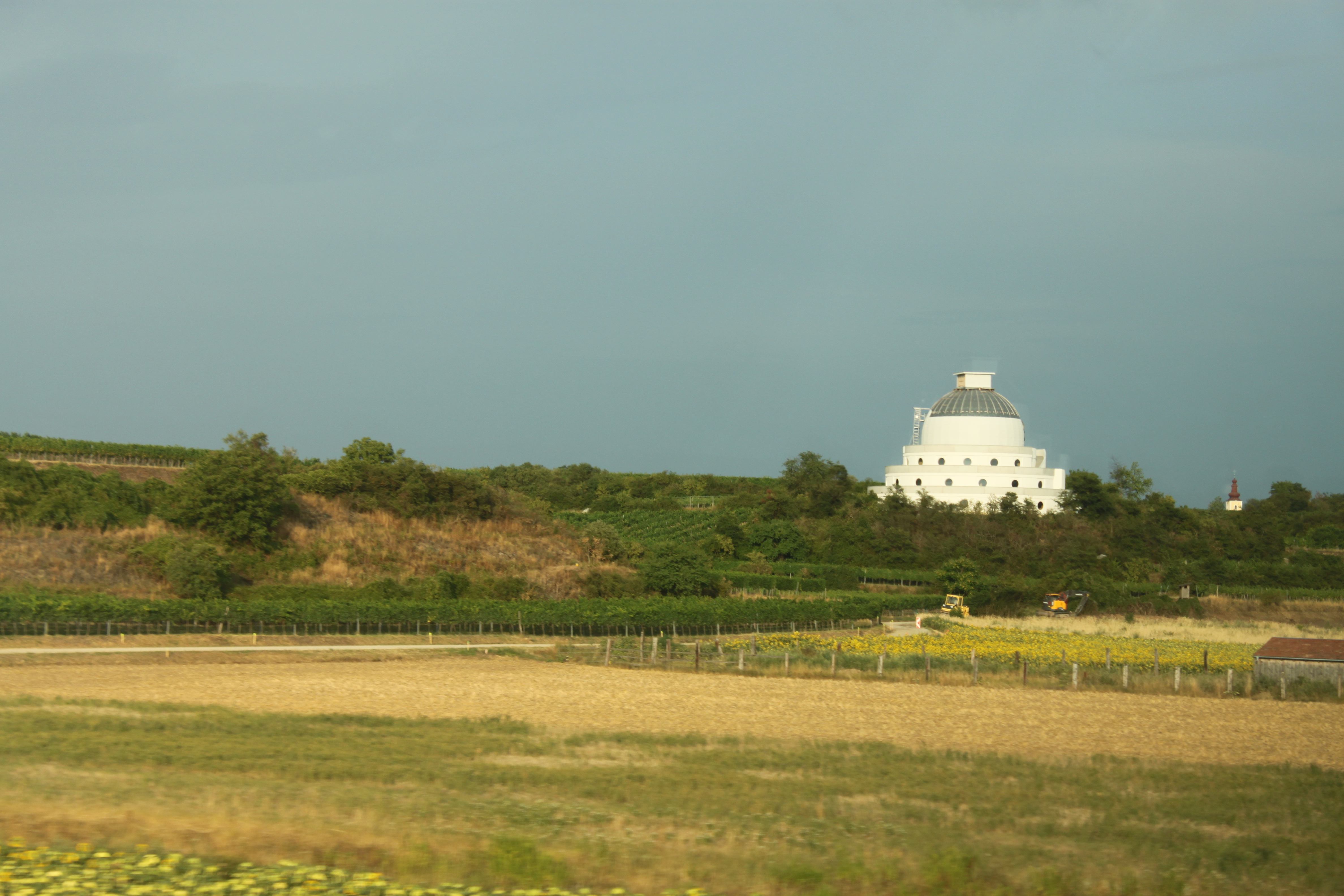 Stupa am Wagram Rohbau, rechts im Hintergrund der Kirchturm der Pfarrkirche Feuersbrunn